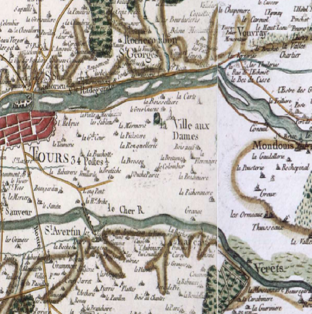 Carte de la région de La Ville-aux-Dames par Cassini, XVIIIè siècle